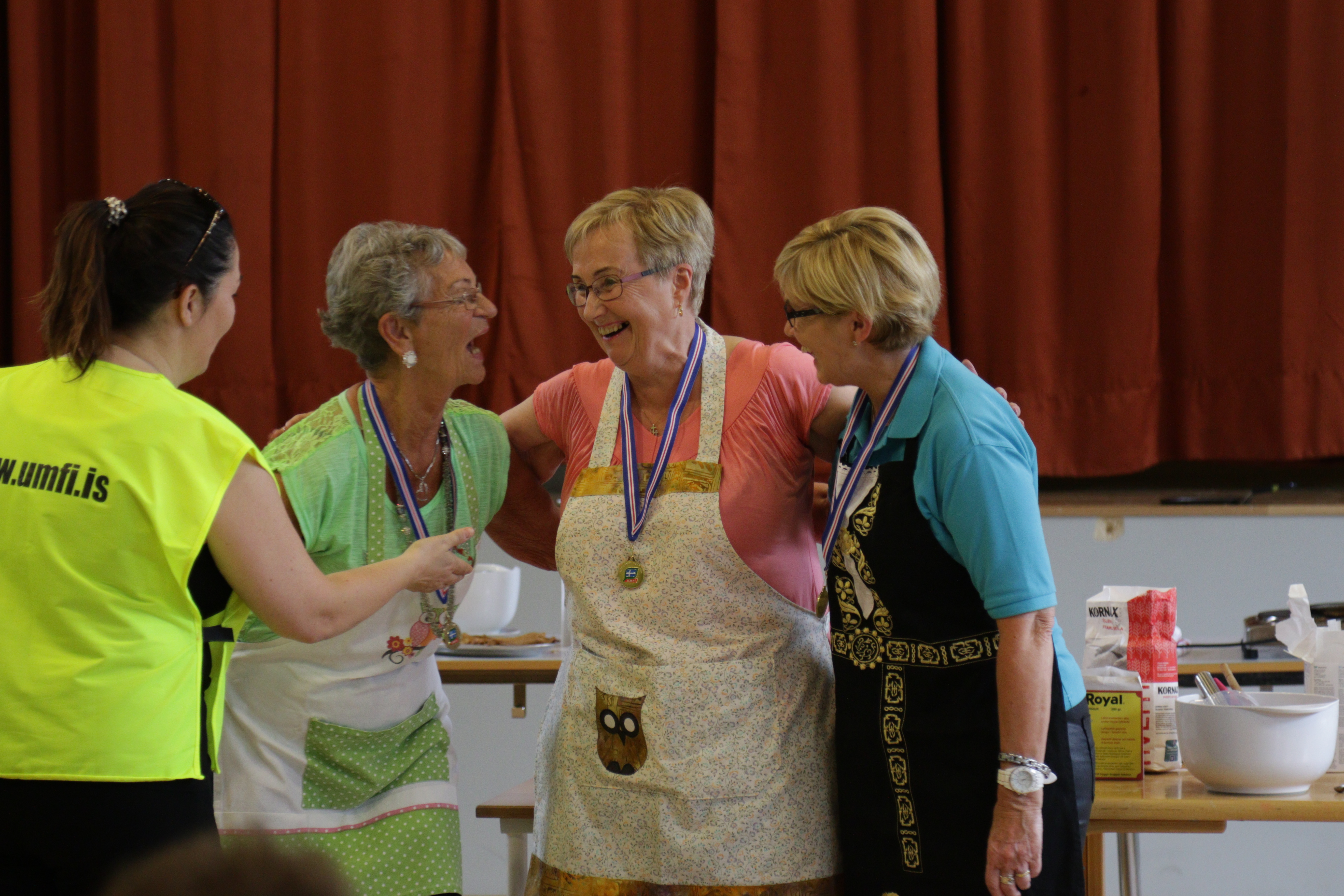 Keppendur í pönnukökubakstri á Landsmóti UMFÍ 50+ á Ísafirði 2016.